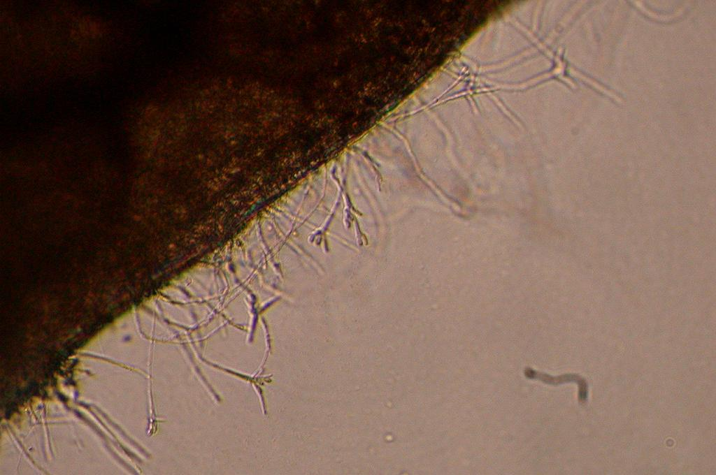 Tetracladium marchalianum 水中落葉の培養にて 2003.11 和歌山県すさみ町